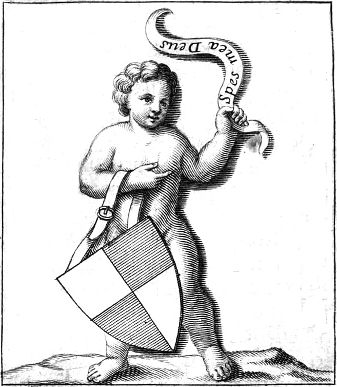 Familiewapen en motto huis Sainte-Colombe